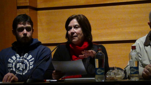 Debate ¿Debe ser Gratuita la Educación en Chile?.